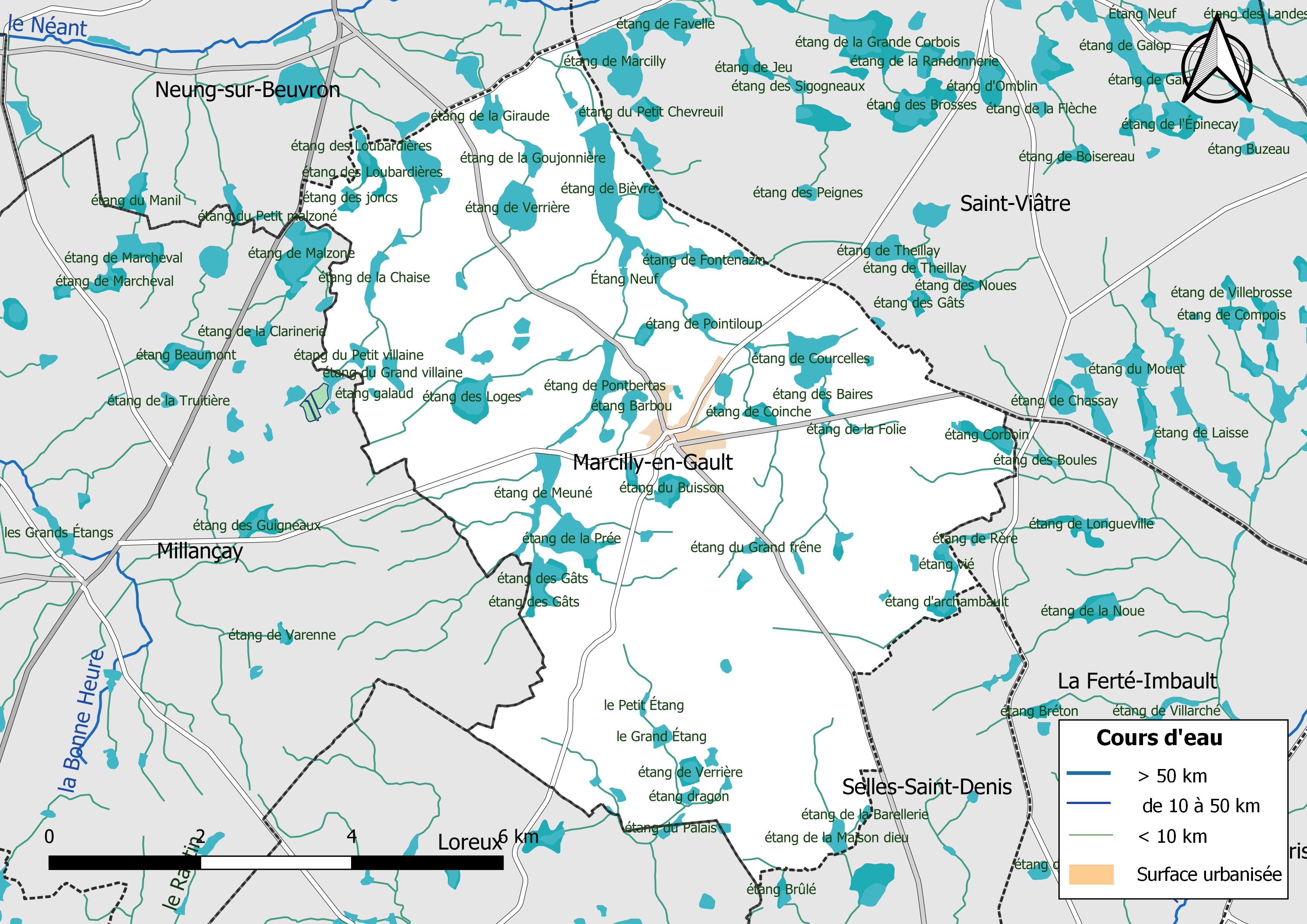 Carte du réseau hydrographique de la commune de Marcilly-en-Gault (Loir-et-Cher, France).